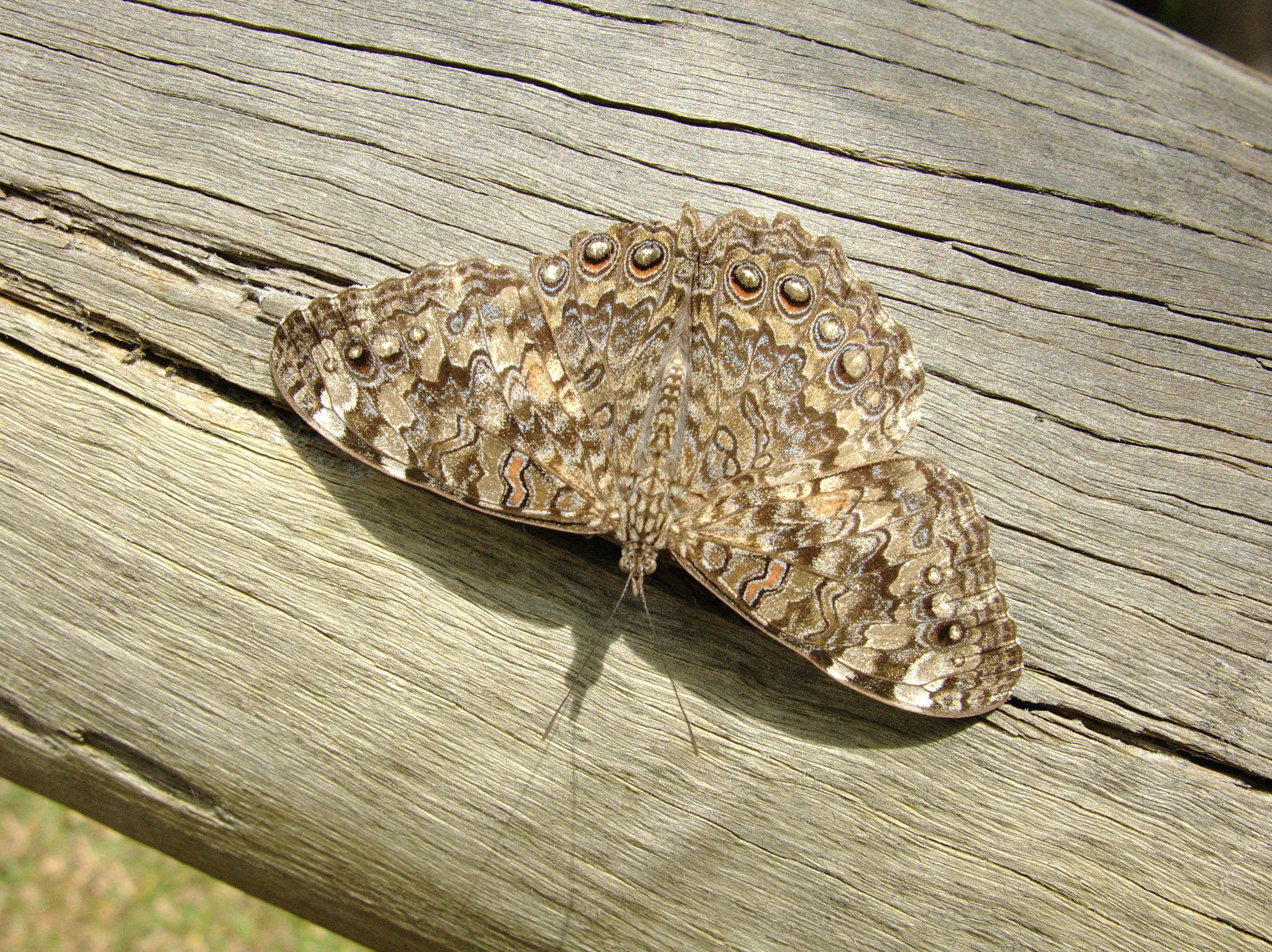 Hamadryas februa (Nymphalidade, Biblidinae), Curitiba, Brasil.